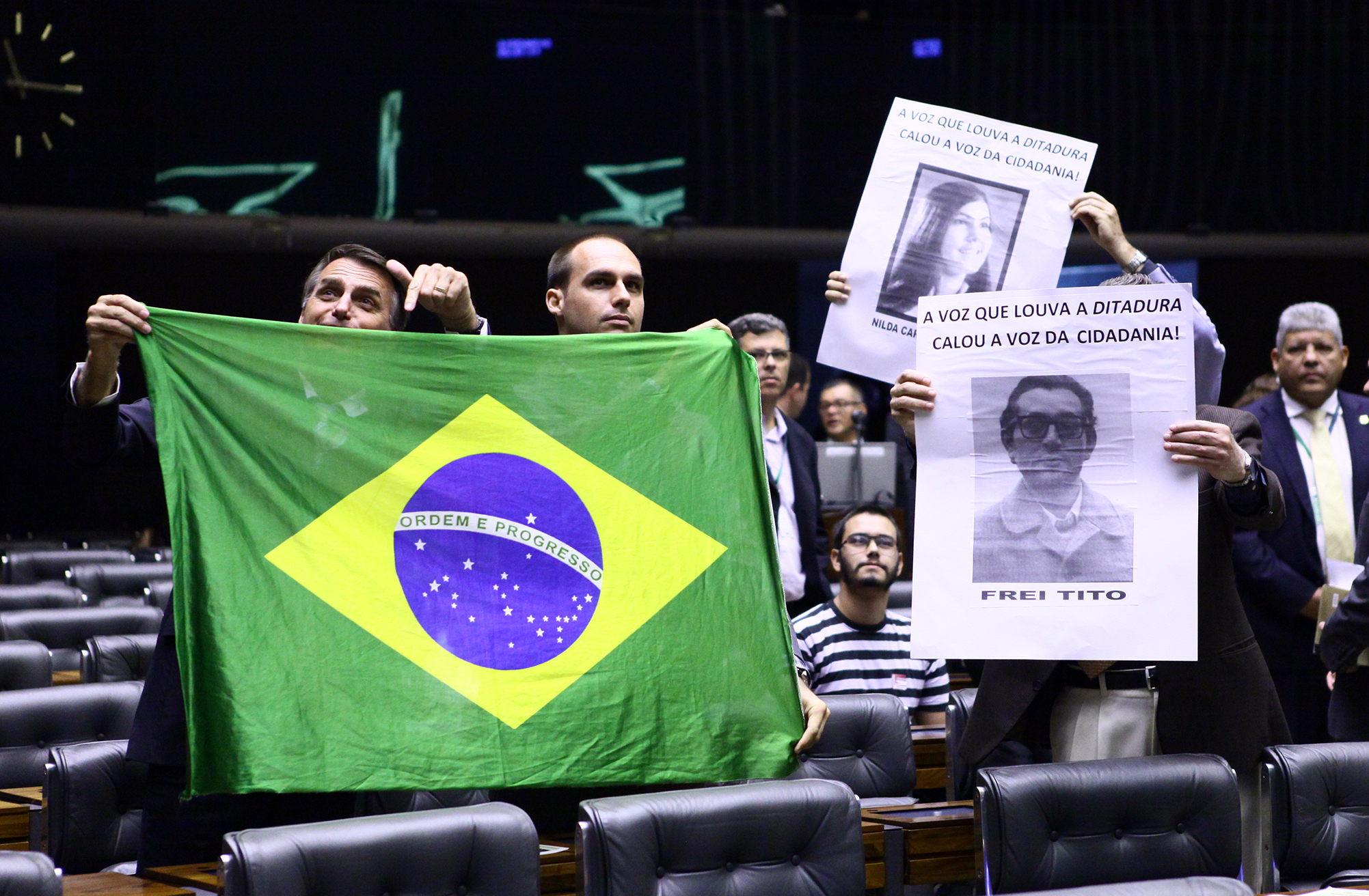 Rememorar os Fatos Relacionados ao dia 31 de Março de 1964, véspera do golpe de estado que deu origem a ditadura militar. Dep. Jair Bolsonaro (PP-RJ) Data: 01/04/2014